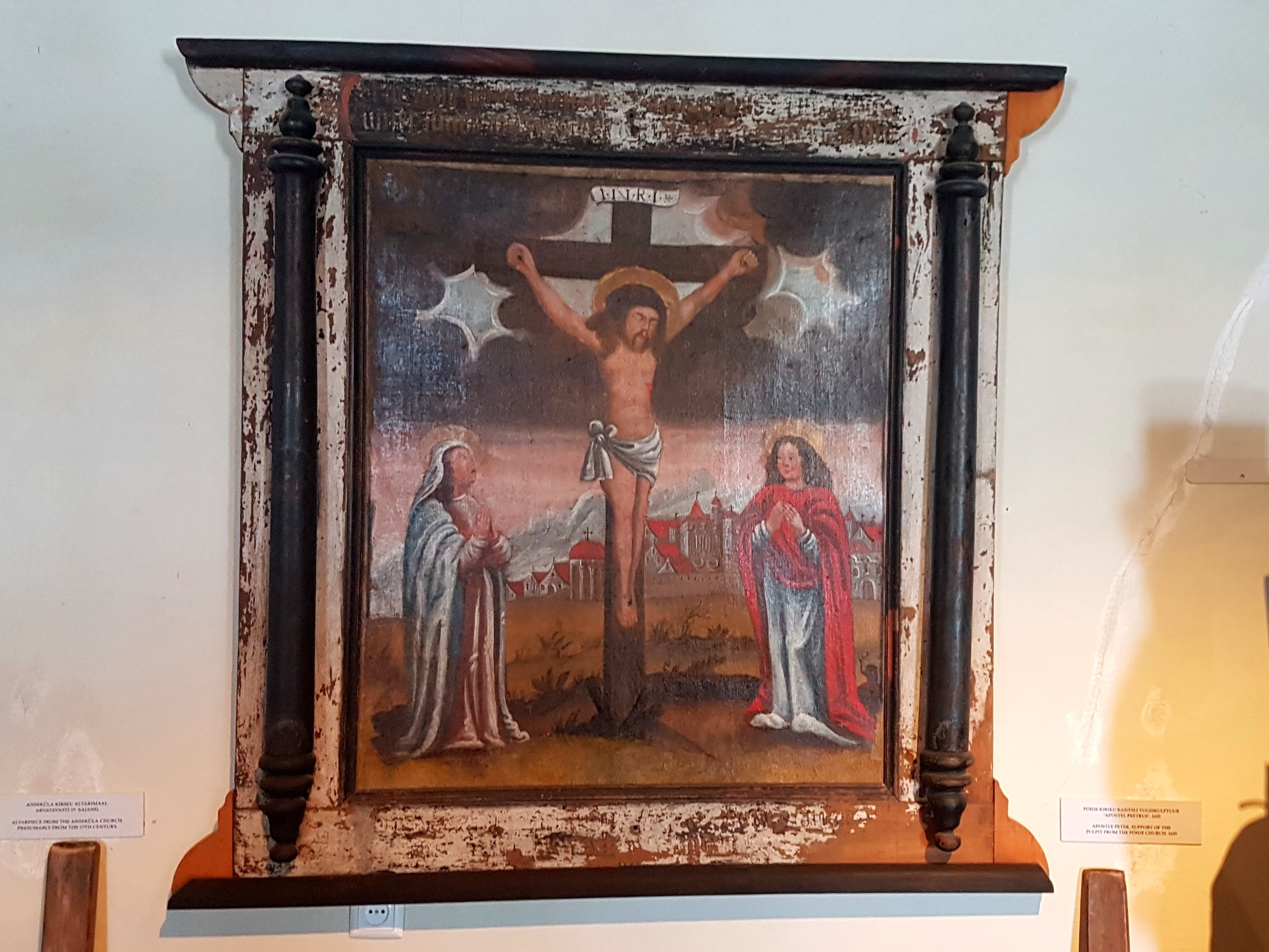 Anseküla kiriku altarimaal 17. sajandist. Asub praegu Saaremaa Muuseumi püsiekspositsioonis Kuressaare linnuses.